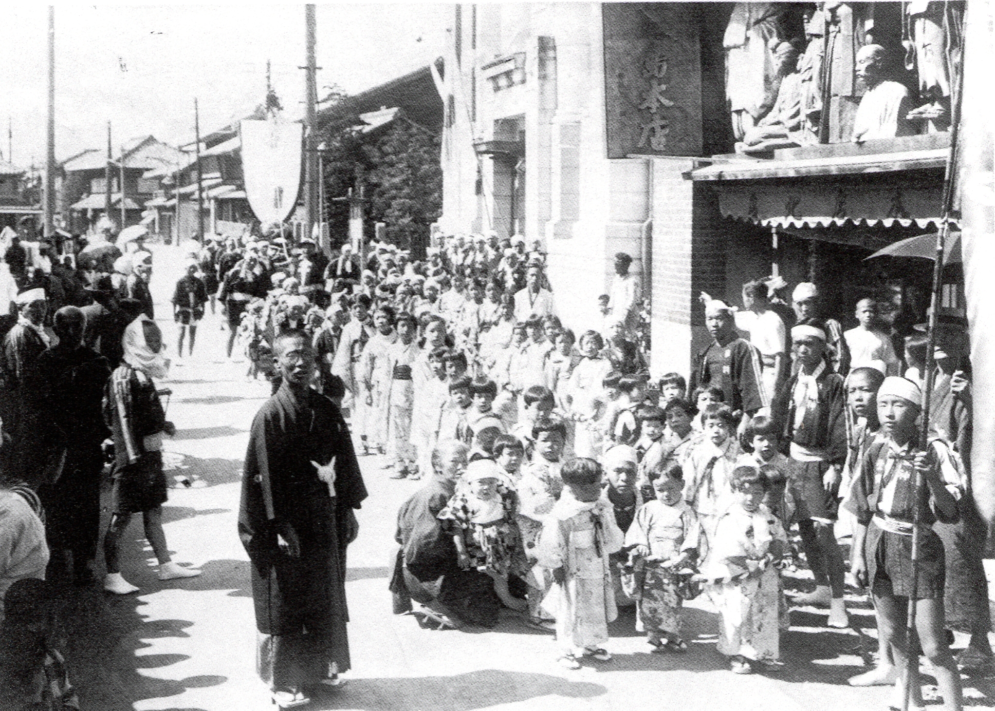 岡崎天満宮の天満天神祭。1920年代。